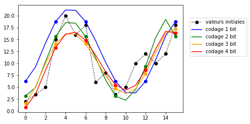 influence du codage (nombre de bits)